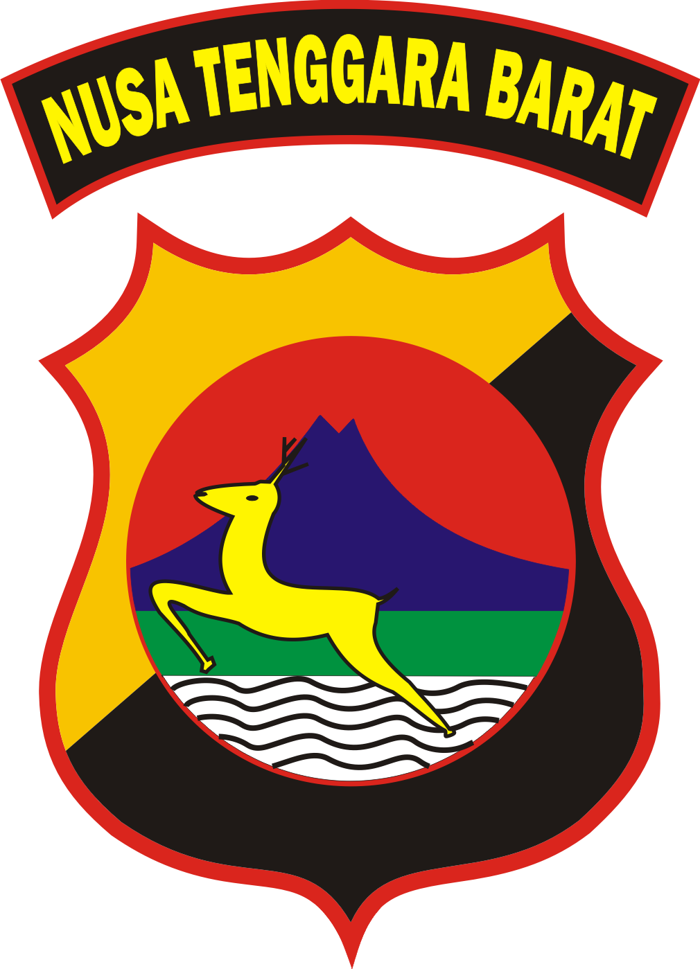 Gambar ini adalah Lambang Kepolisian Daerah Nusa Tenggara Barat